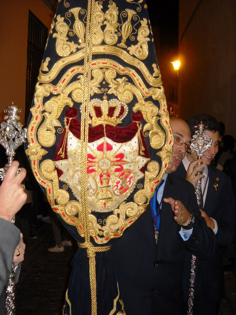 Escudo que aparece en el bacalao de la Hermandad